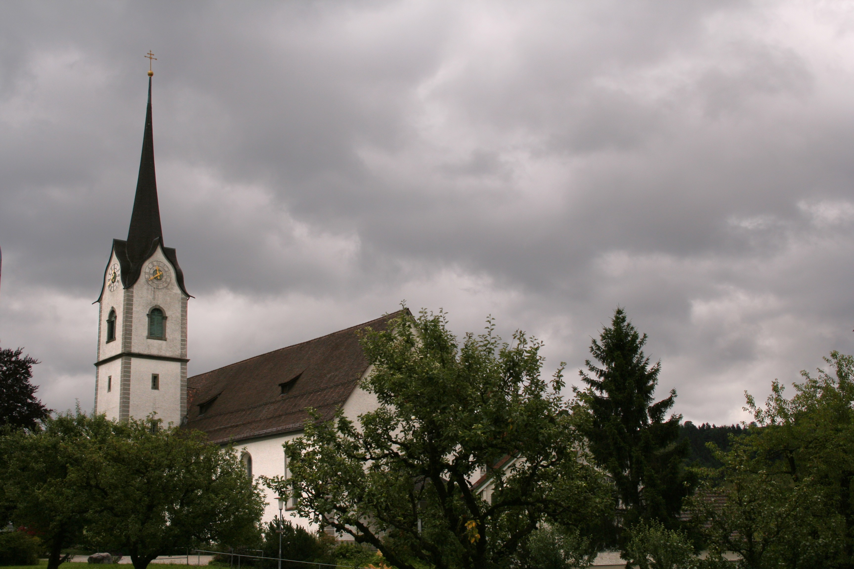 Die katholische Kirche von Eggersriet